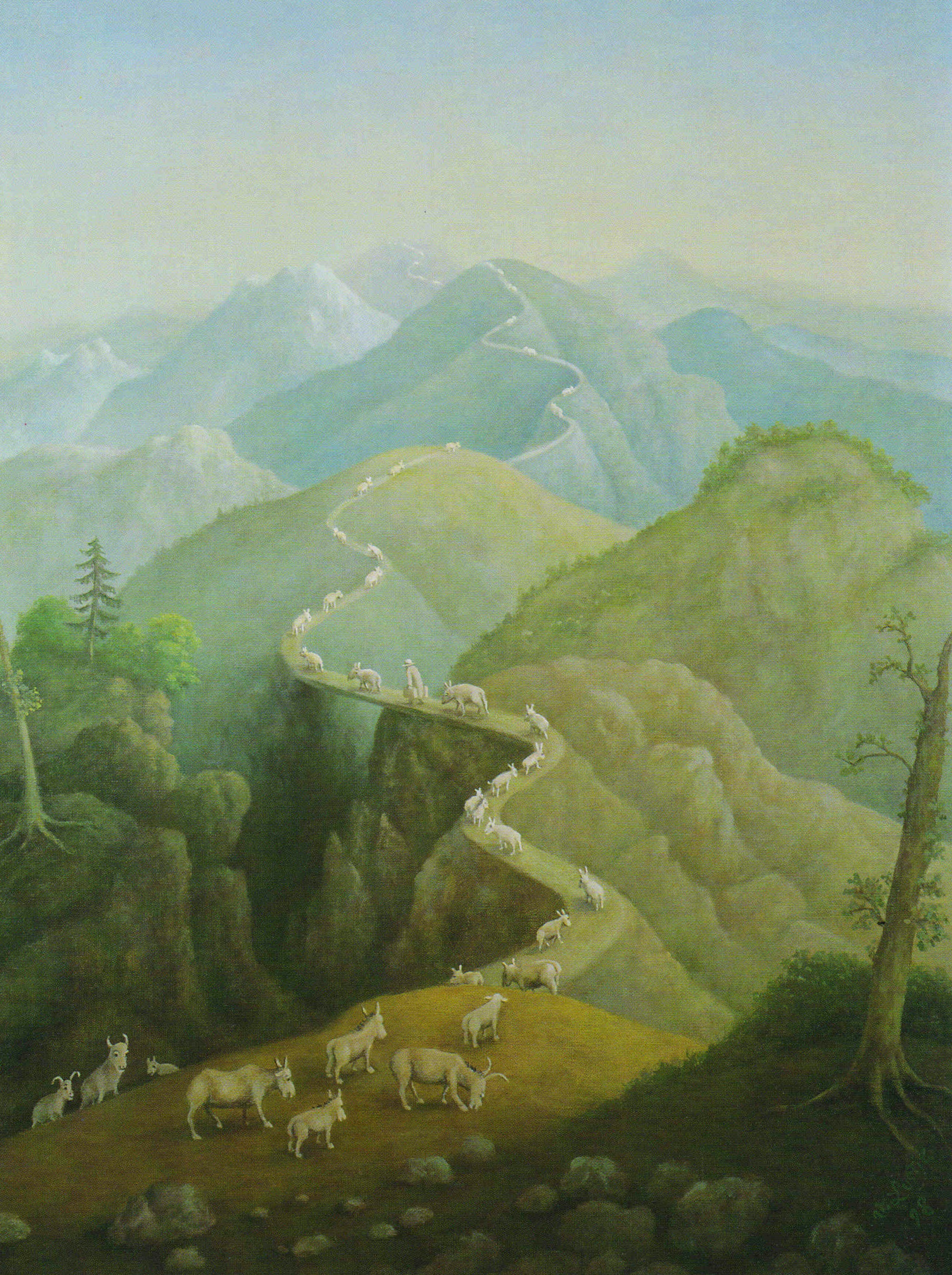 Der unendliche Alpaufzug – Die Schönheit besiegt die Zeit und umgekehrt